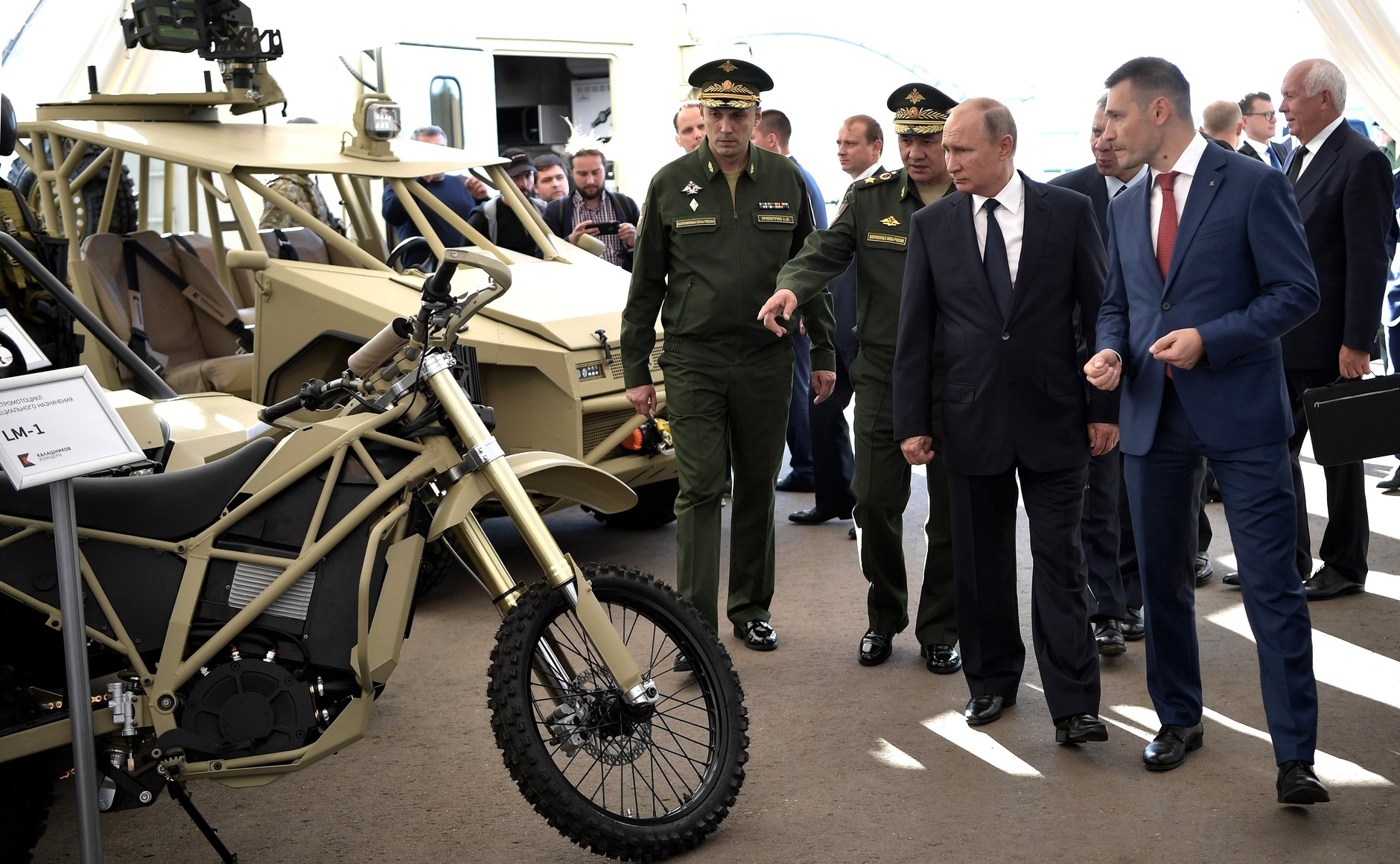 Посещение Президентом России Владимиром Путиным Военно-патриотического парка культуры и отдыха Вооружённых Сил Российской Федерации «Патриот». Во время осмотра экспозиции концерна «Калашников».